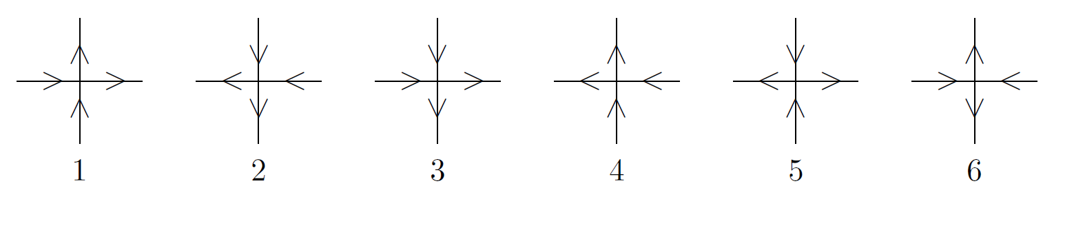 Les 6 différents types de vertex du modèle à six vertex